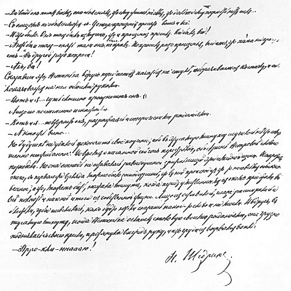 Page of the manuscript of the novel " Golovlevs ." Saltykov-Shchedrin